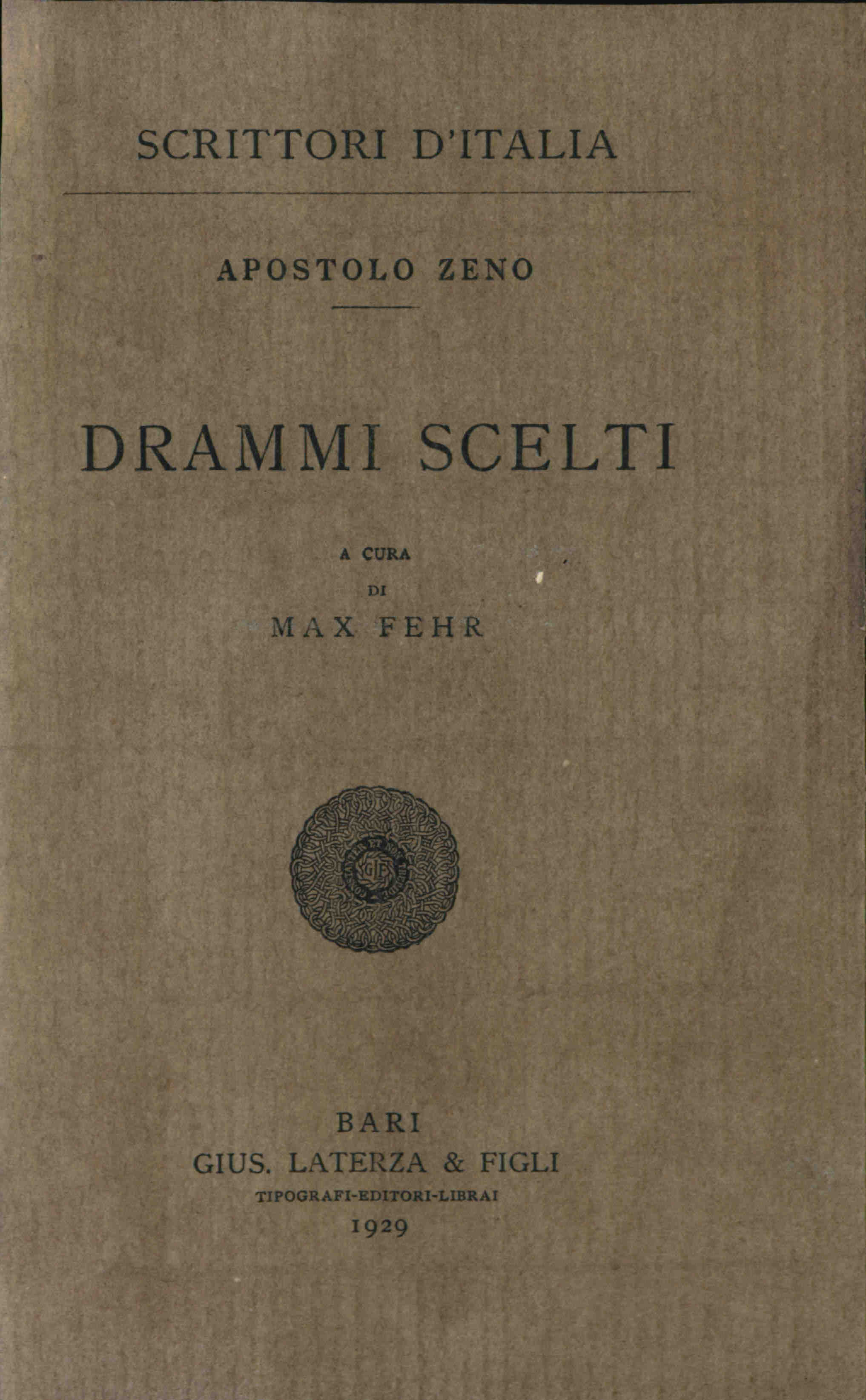 Drammi scelti / Apostolo Zeno ; a cura di Max Fehr. - Bari : G. Laterza, 1929. - 289 p. ; 22 cm. - (Scrittori d'Italia ; 117). [1]